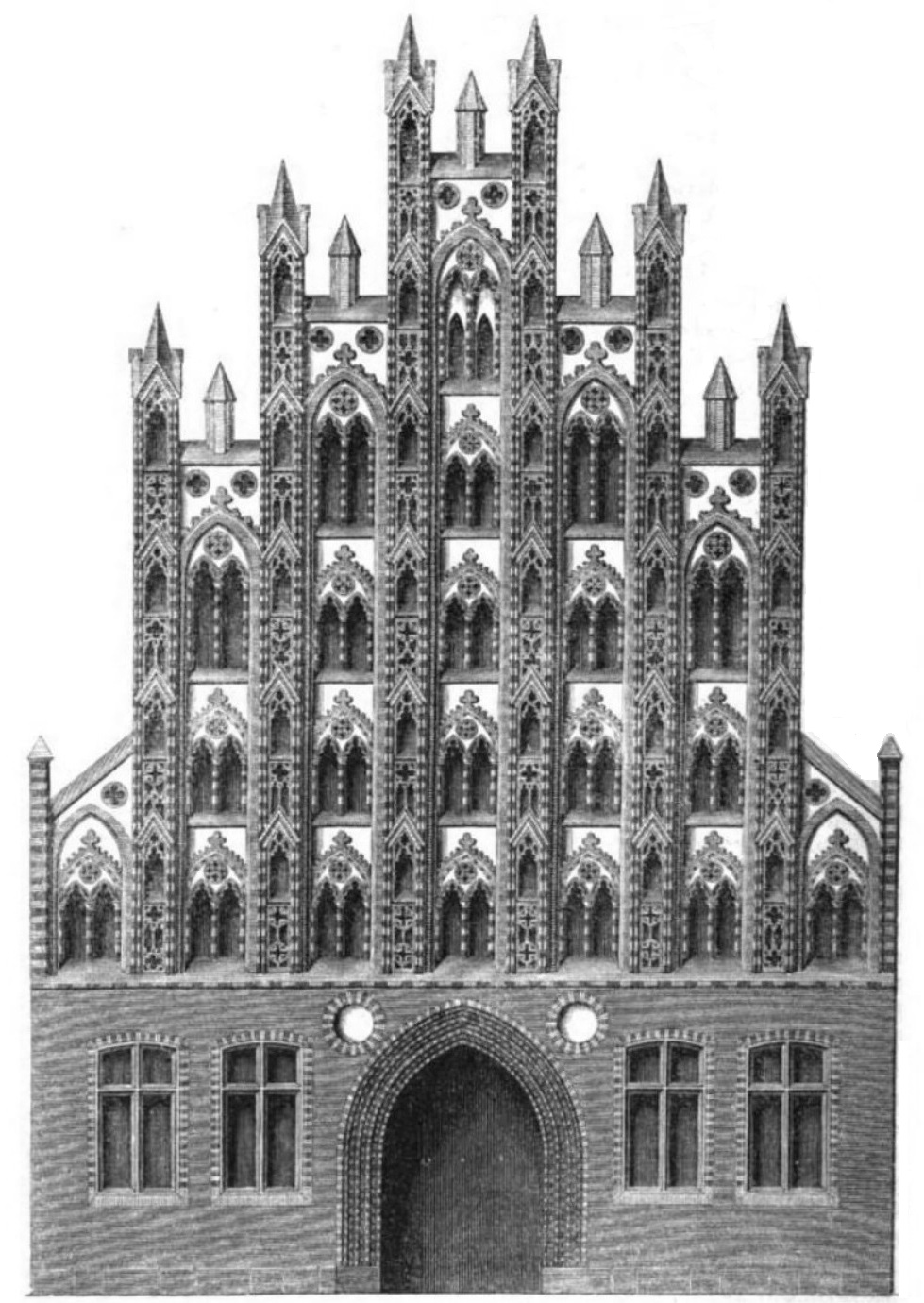 Zeichnung der ursprünglichen Fassade des Backsteingiebelhauses Markt 11 in Greifswald.